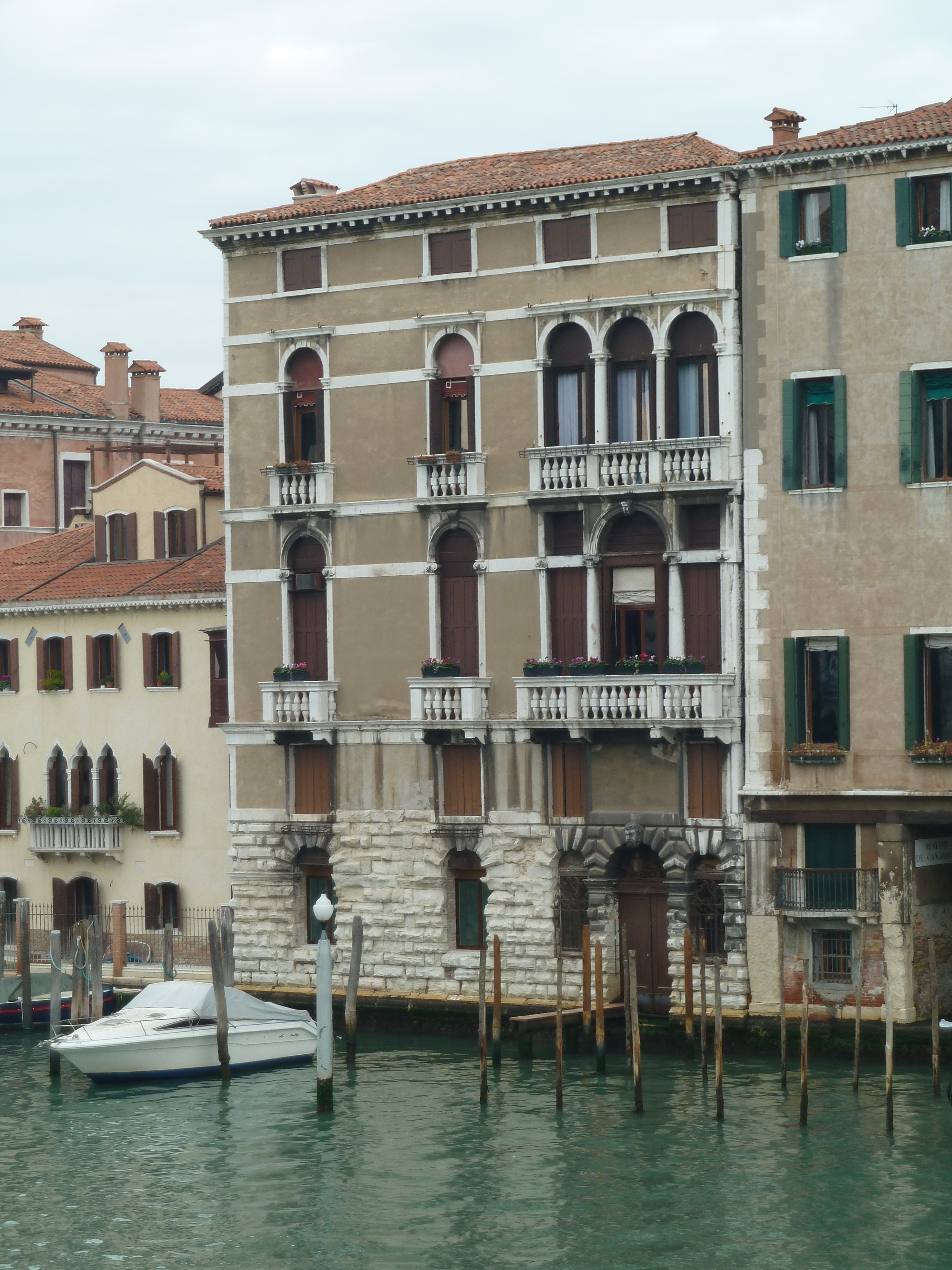 Palazzo Ghisi Boldù (Venice)